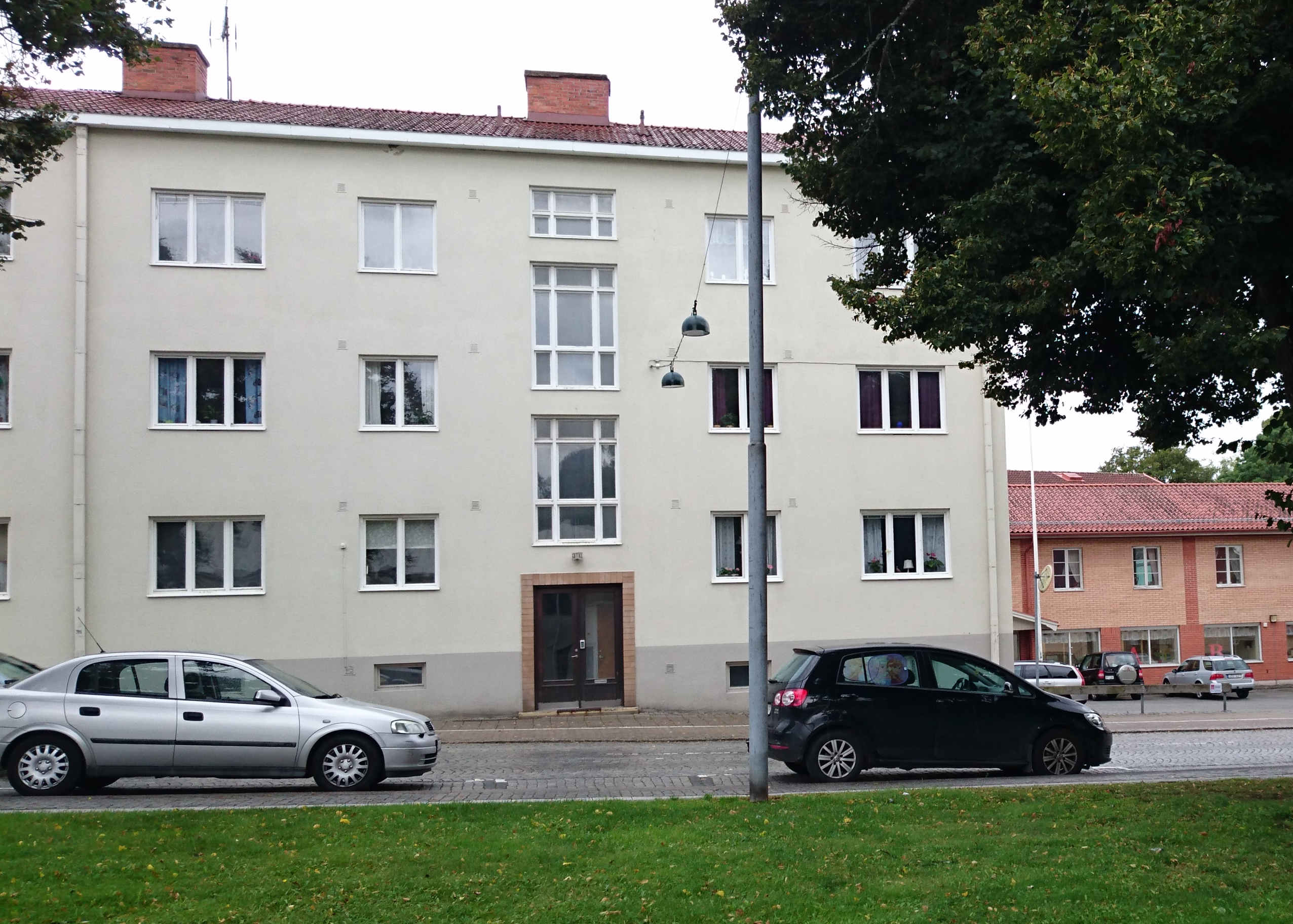 Kvarteret Bror 2017 med exempel på flerbostadshus från 1947 samt nyare postmodernistisk byggnad längre bak i bild.